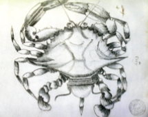 Gravura de Siri, imagem de domínio público.